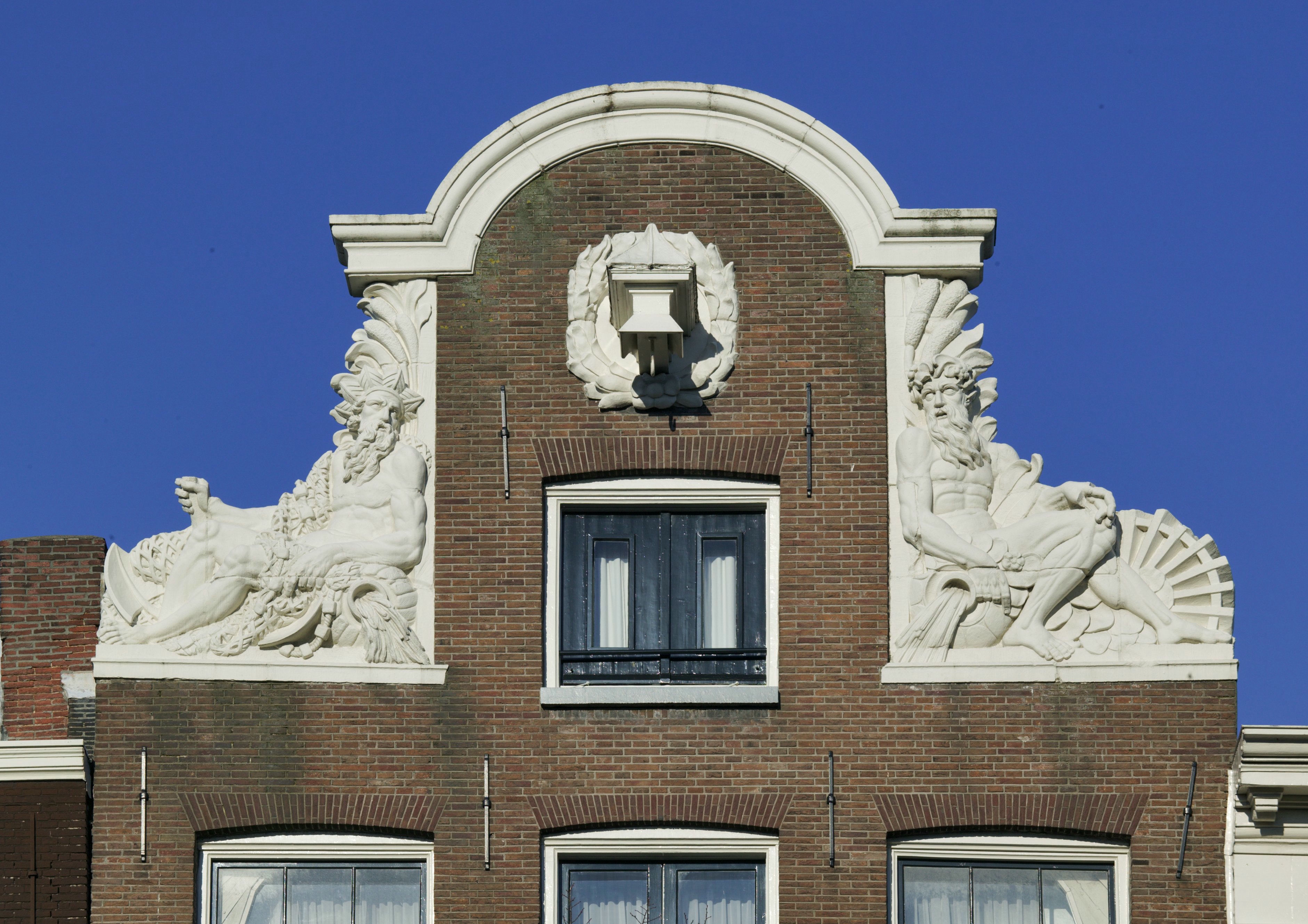 Gevel/ Stucwerk: Topgevel, stucwerk van Stroomgoden (opmerking: Gefotografeerd voor: P.M. Fischer, Ignatius en Jan van Logteren, Alphen a/d Rijn 2005.)